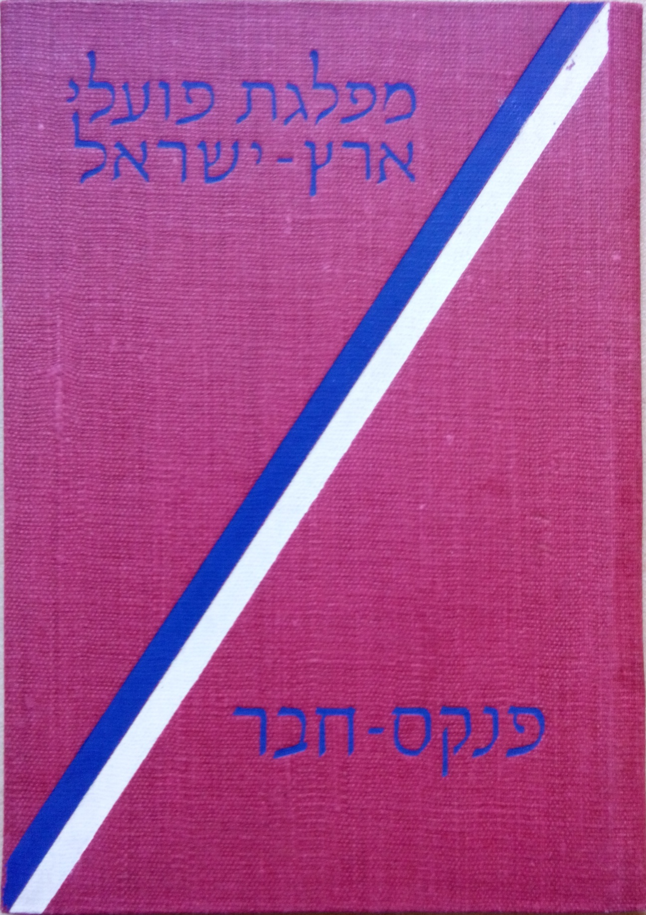 פנקס חבר של תנועת מפא"י